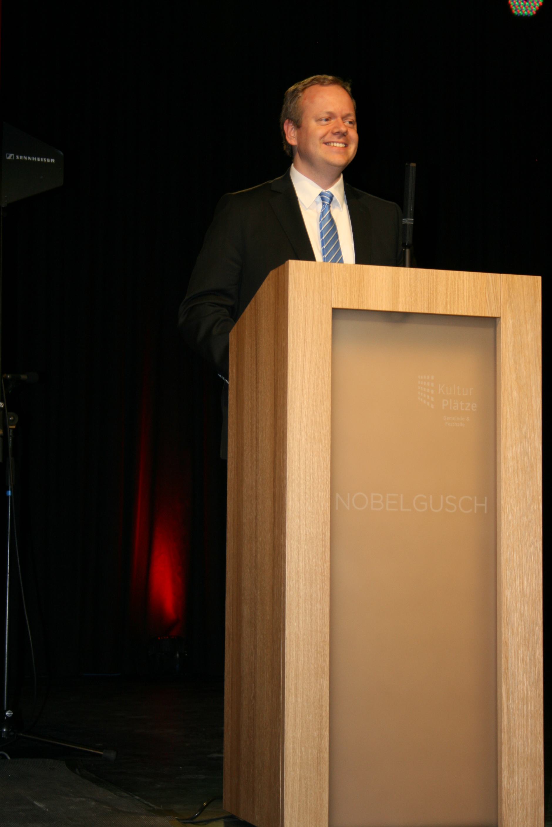 Landrat Matthias Neth bei der Einweihung der Gemeinde- und Festhalle Nobelgusch in Pfedelbach